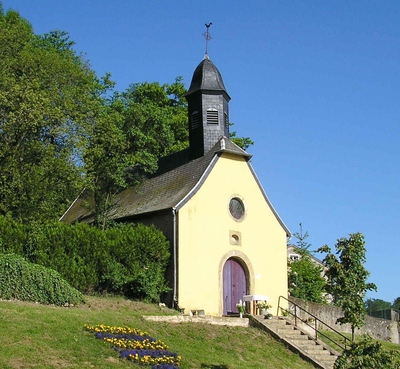 Rodemack (Lothringen), Die Kapelle Notre-Dame (17. Jh.)